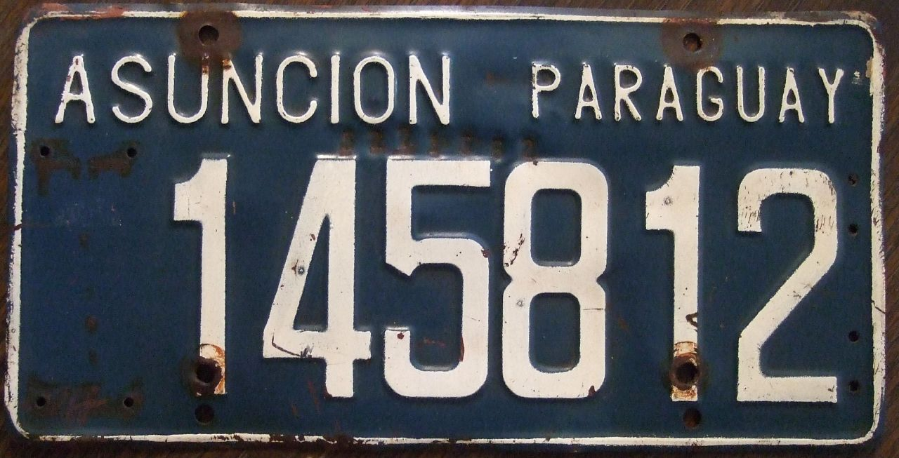 PARAGUAY, Asuncion 1990'S passenger